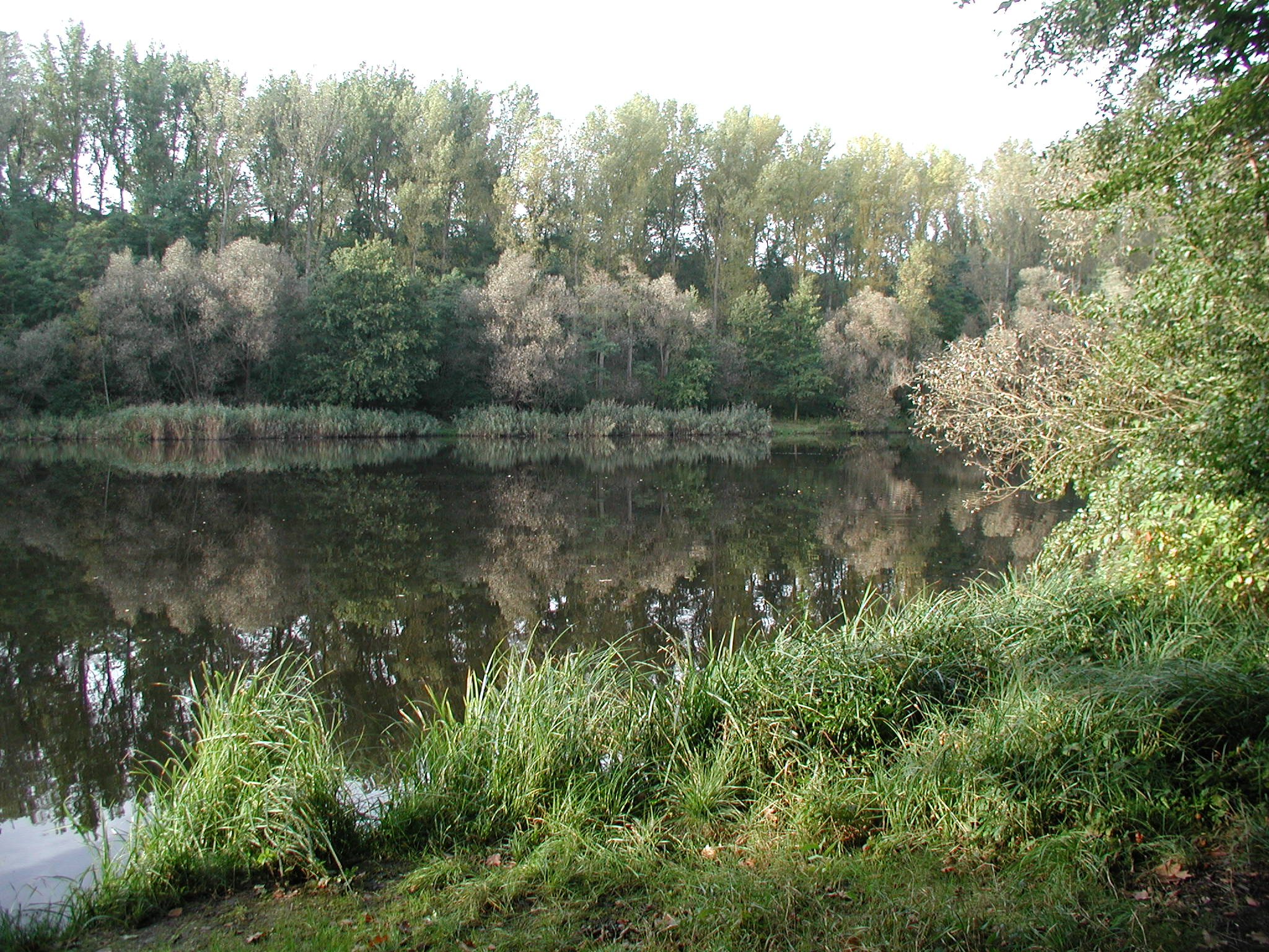 Huerth-Berrenrath, Gotteshülfesee nahe Burg Schallmauer